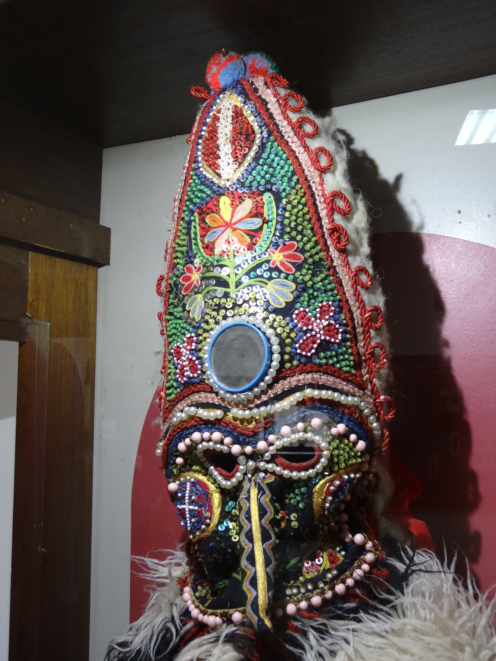 Burgas Ethnographic Museum